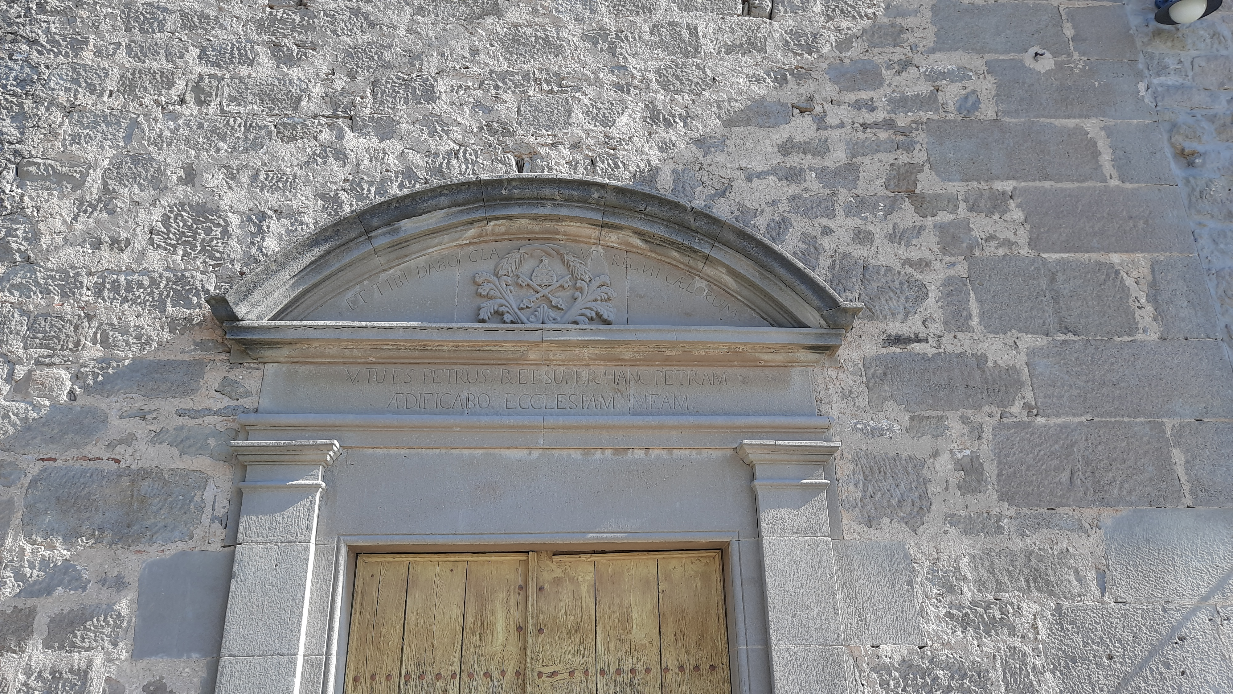 Sant Pere de l'Esglesiola. Detall de la porta amb la inscripció.